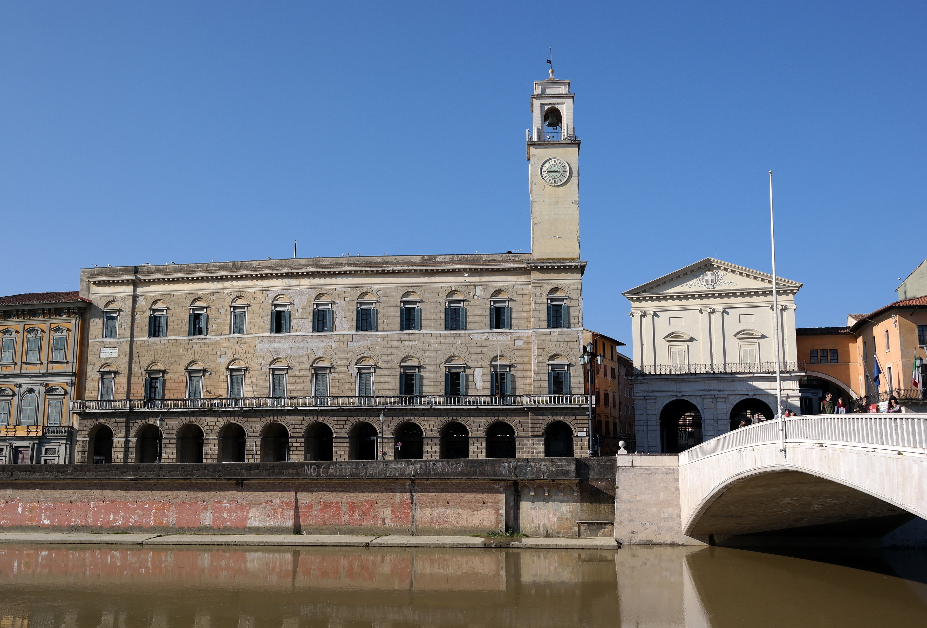 Palazzo Pretorio e Ponte di Mezzo a Pisa